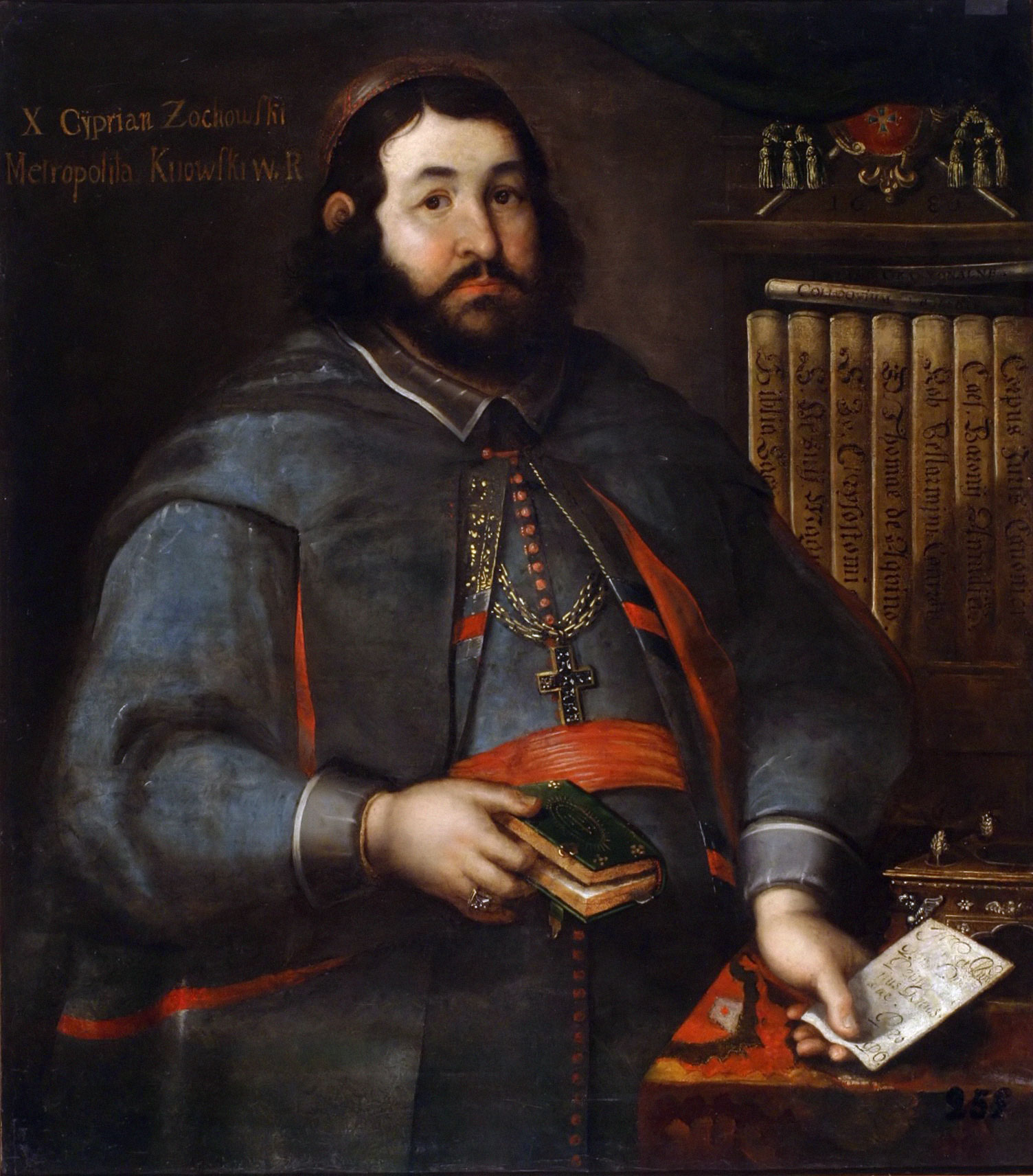 Кіпрыян Жахоўскі, уніяцкі мітрапаліт Кіеўскі. 1680 г. Беларуская (тарашкевіца): Партрэт Кіпрыяна Жахоўскага (Kipryjan Žachoŭski)